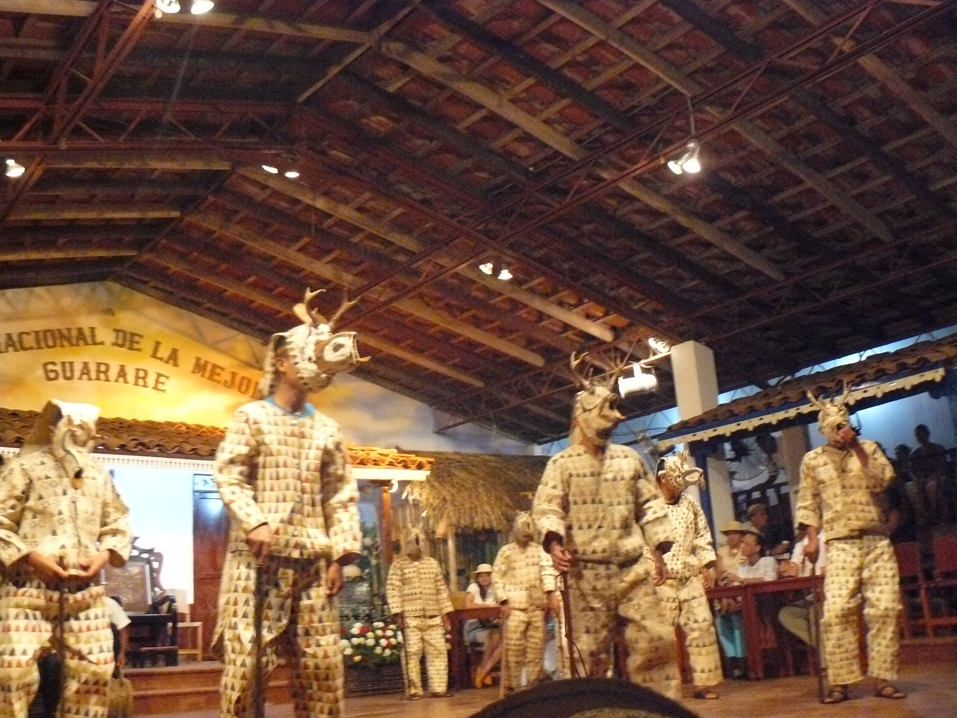 Presentación de los Cucuas en Festival de Guararé